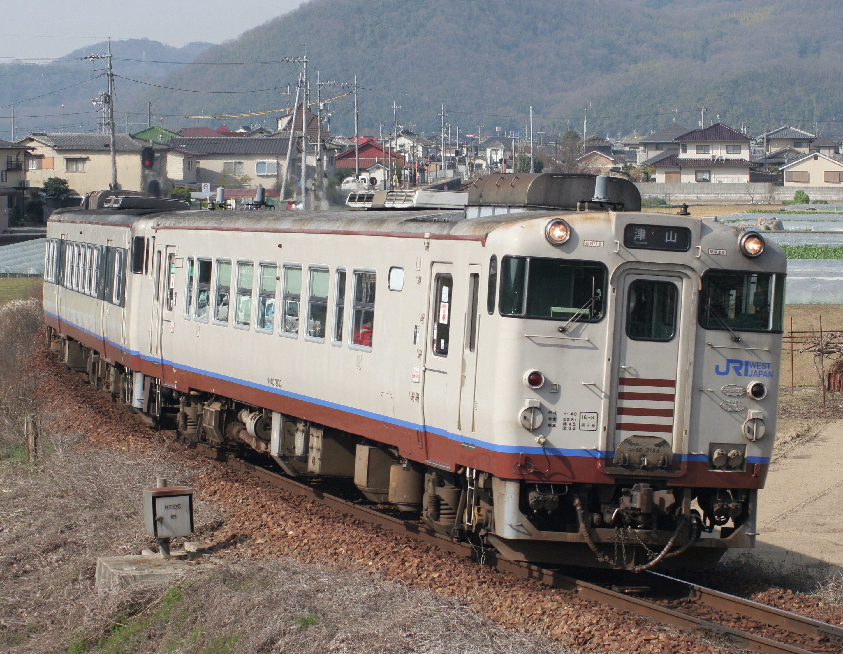 JR西日本キハ40系気動車キハ40形2133 津山線、玉柏 - 牧山